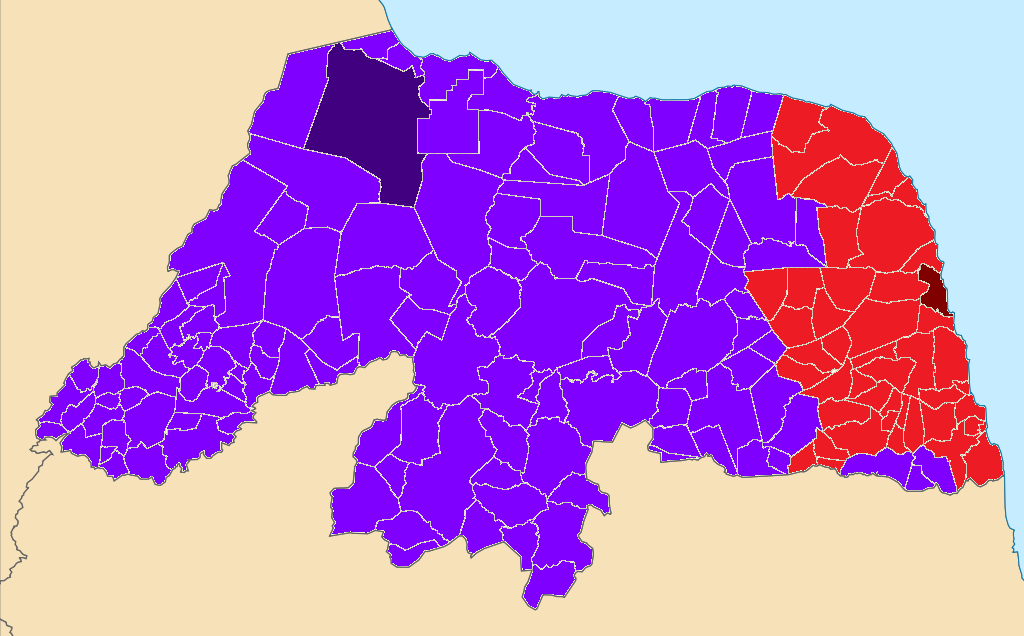 Cobertura da Rede InterTV no Rio Grande do Norte